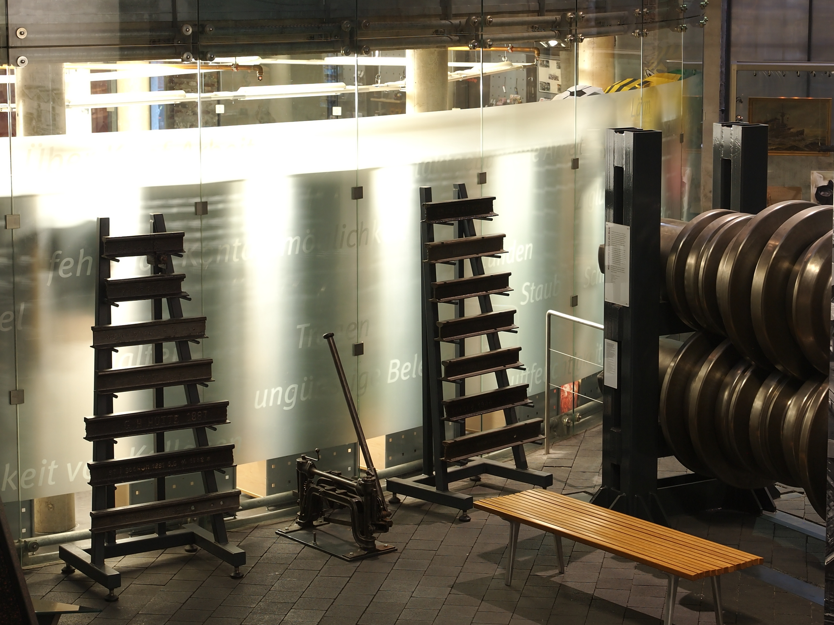 Muster von Eisenbahnschienen und Walzengerüst (rechts) für Schienen im LVR-Museum Zinkfabrik Altenberg in Duisburg